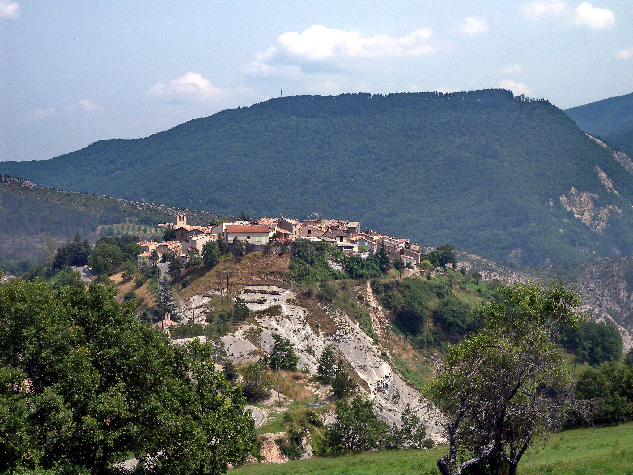 Village perché de Saint-Benoît (Alpes-de-haute-Provence)